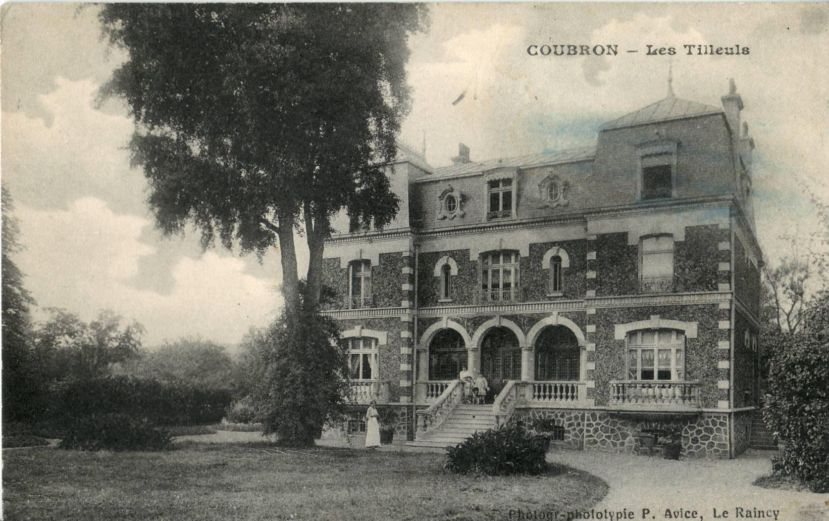 Carte postale ancienne éditée par P. Avice, phtotogr. phototypie au Raincy : COUBRON - Les Tilleuls